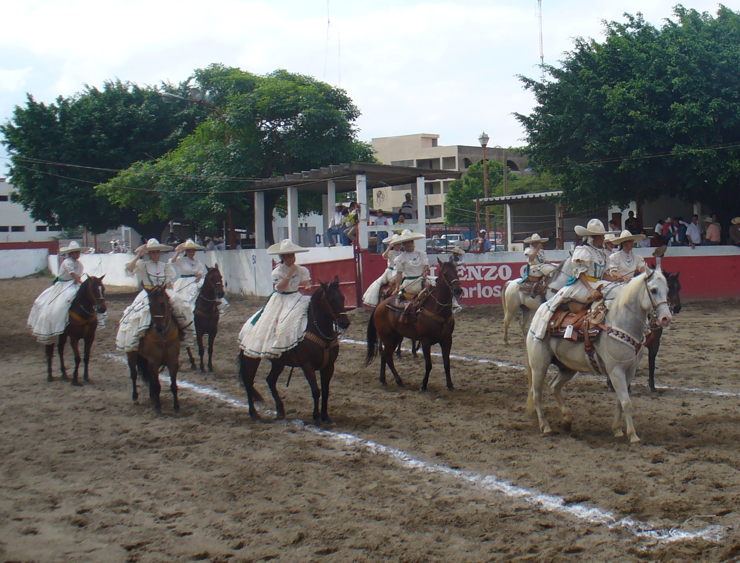 Entrada de Escaramuzas Charras